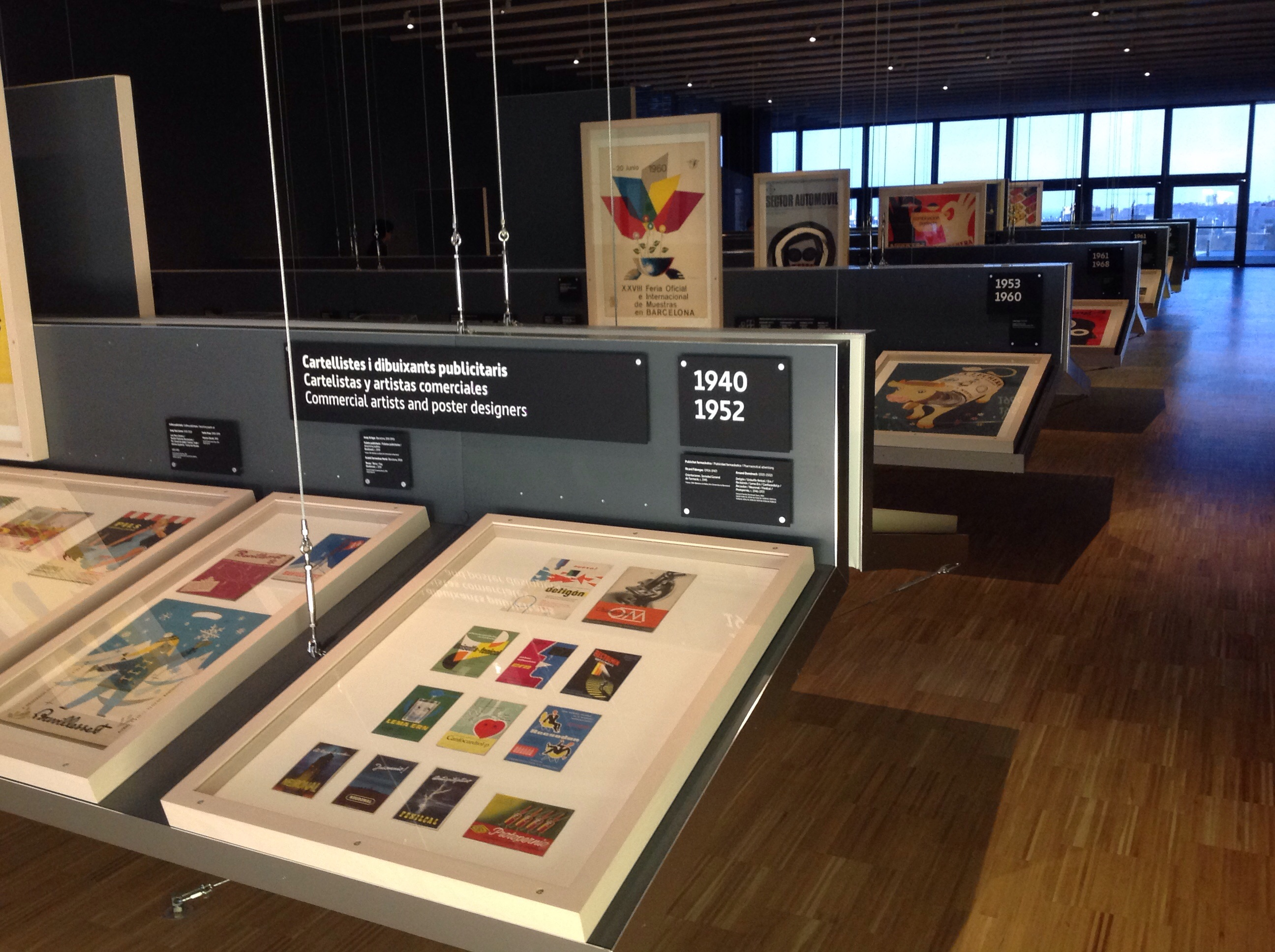 El disseny gràfic: d'ofici a professió: exposició tempora al Museu del Disseny